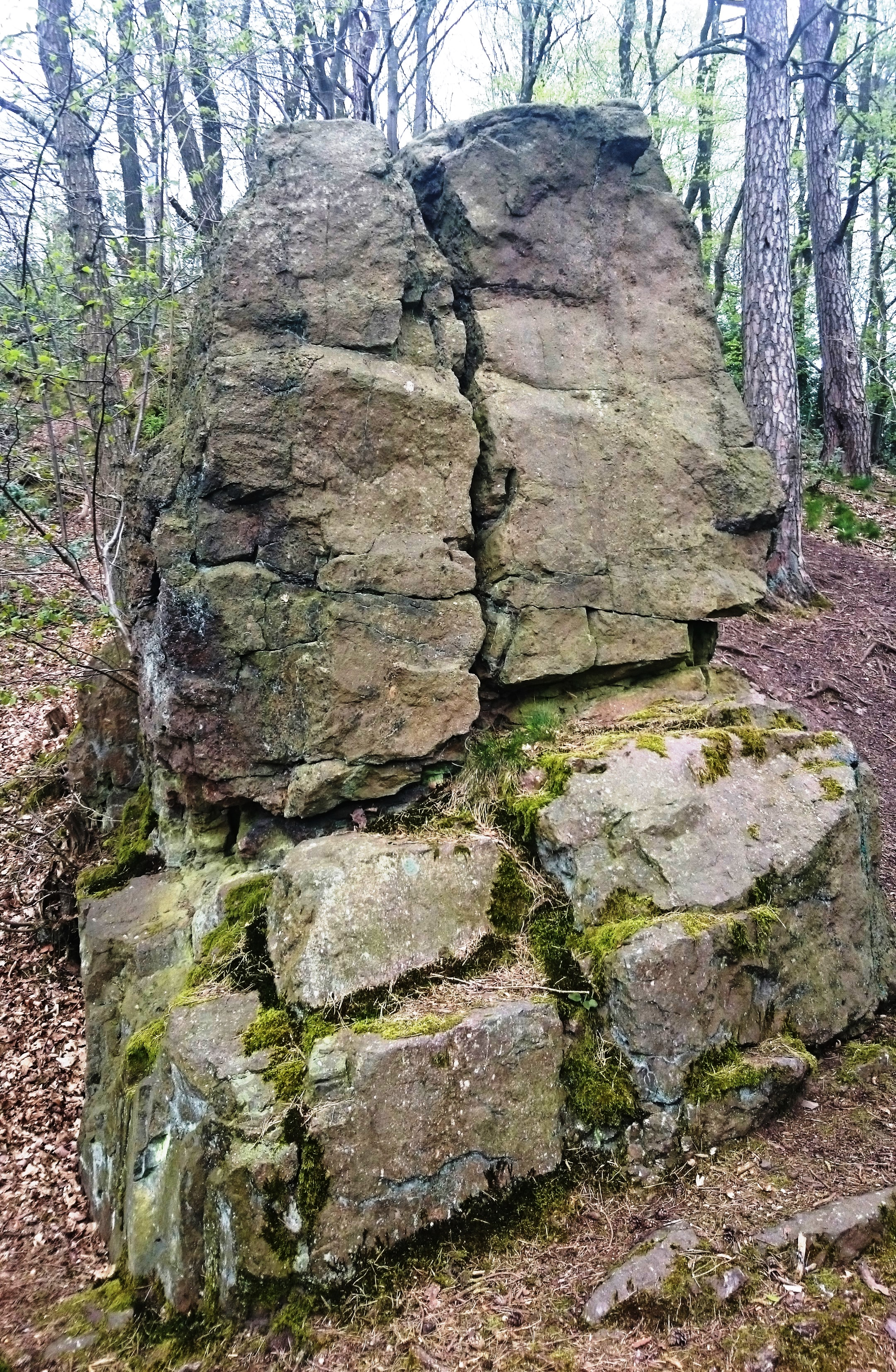 Naturdenkmal Kluckensteine